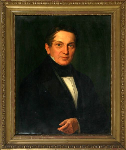 Prof. Dr. Johann Gottfried Stallbaum (1793–1861), Rektor der Thomasschule